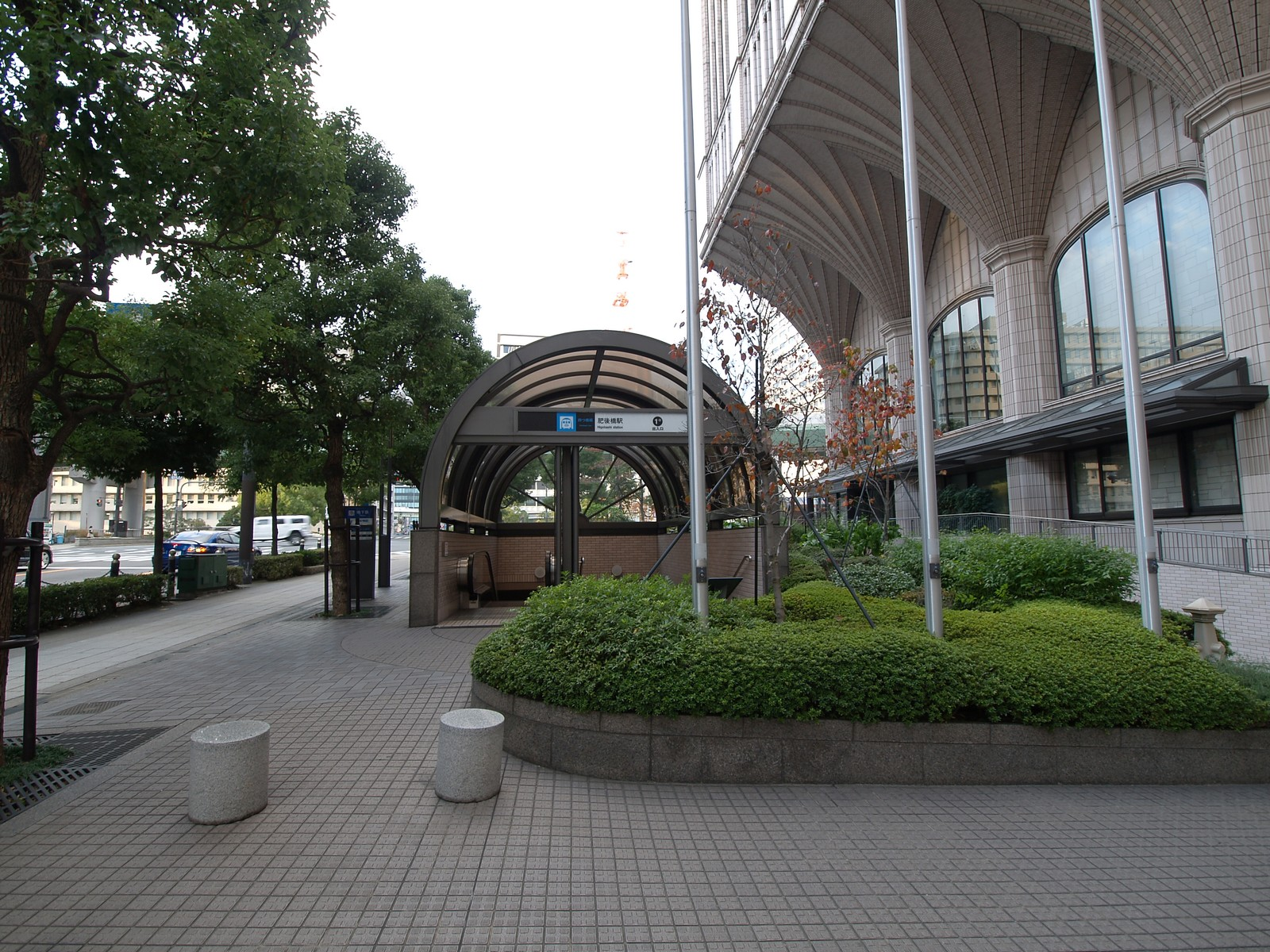 大阪市営地下鉄 四つ橋線 肥後橋駅 １－Ｂ号出入口付近 所在地：大阪府大阪市西区江戸堀１丁目